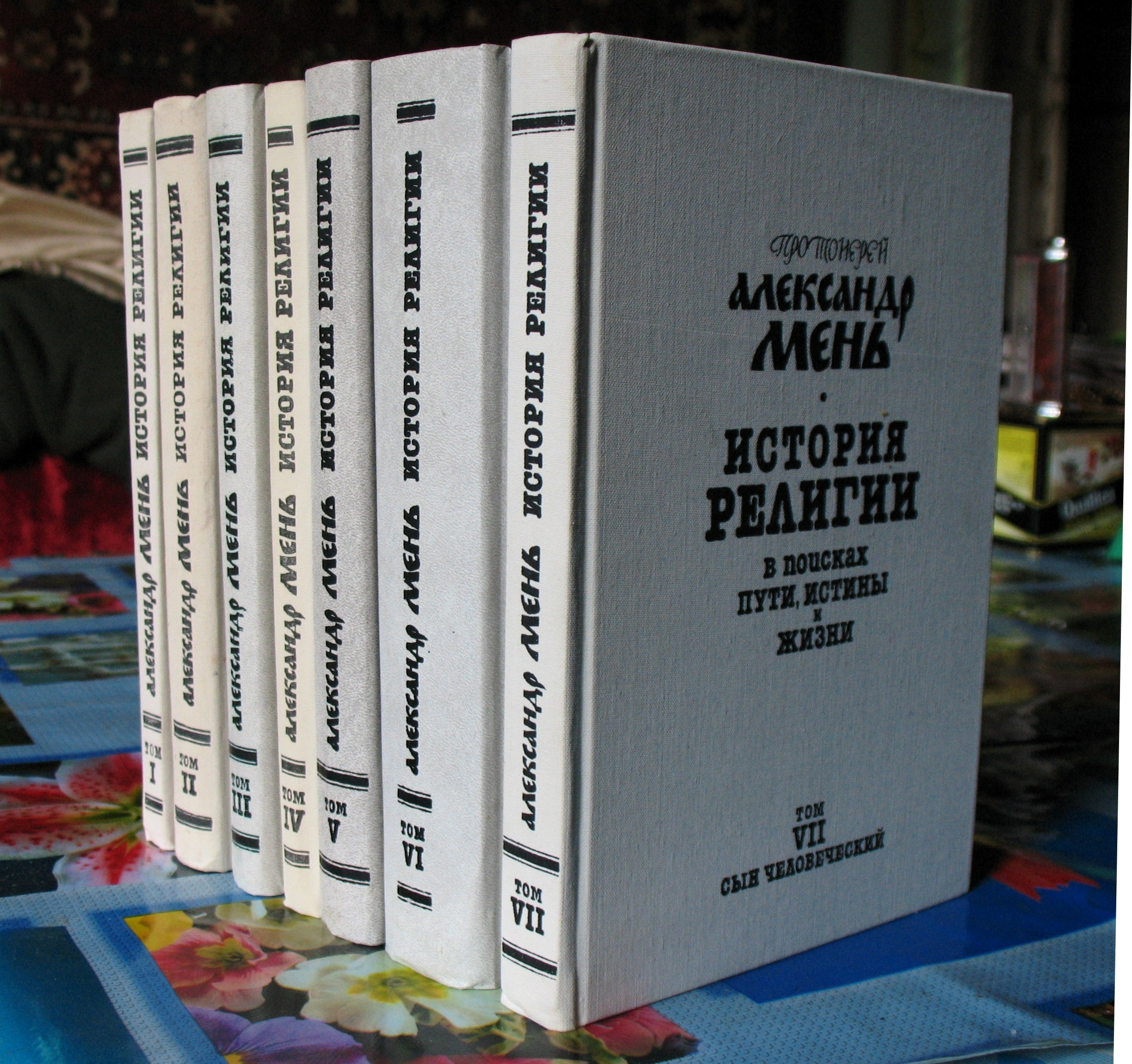 Протоиерей Александр Мень. История религии в семи томах.